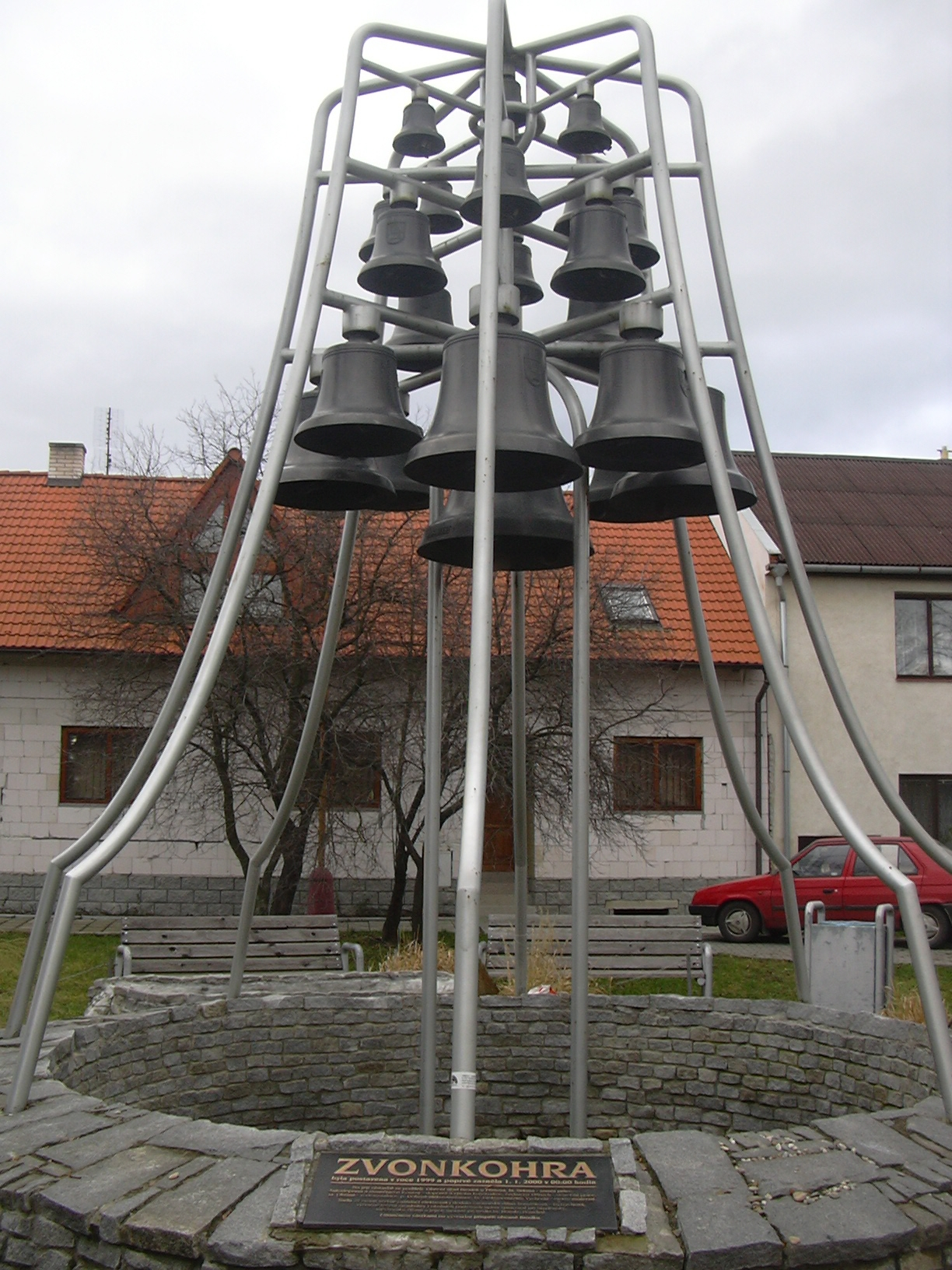 Zvonkohra náměstí T. G. Masaryka v Brodku u Přerova